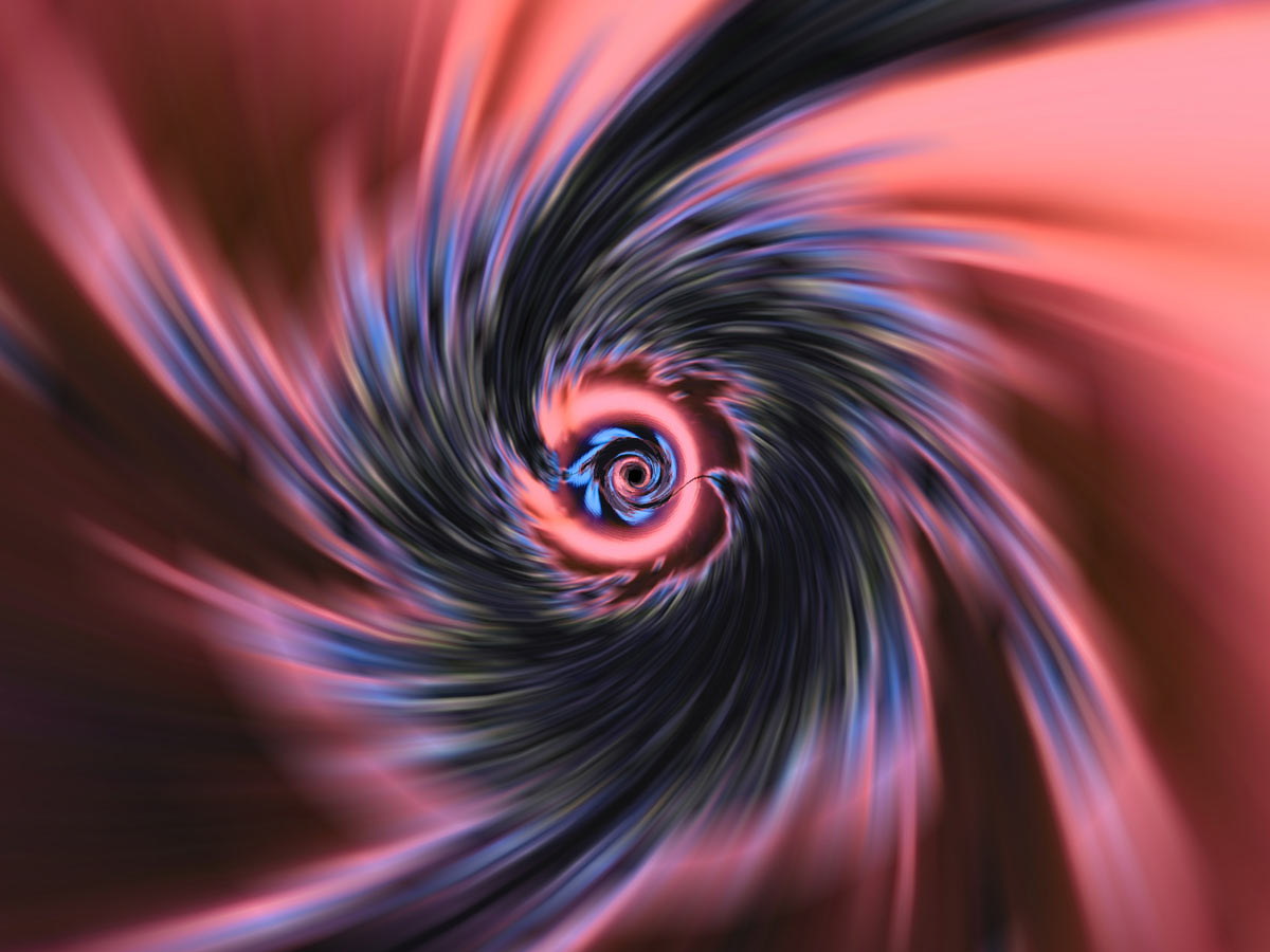 Imagem manipulada no Photoshop.